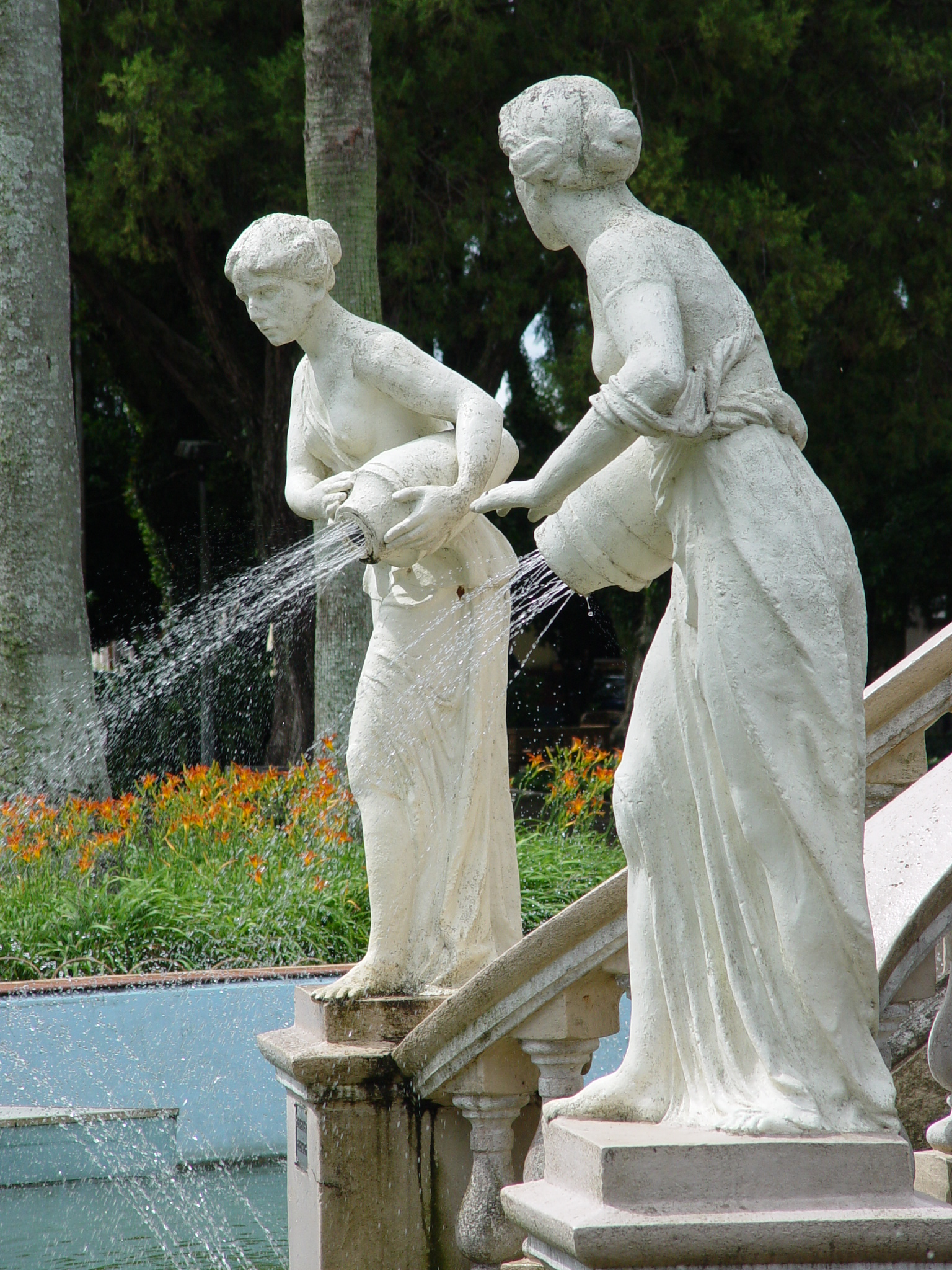 Ninfas, monumentos existentes no Château d'Eau, em Cachoeira do Sul